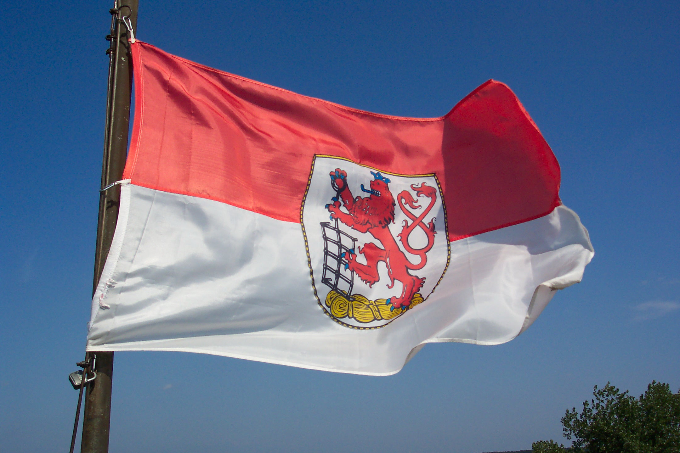 Flagge Wuppertals auf dem Bismarkturm auf der Hardt (Bild vor dem speichern vertikal gespiegelt)